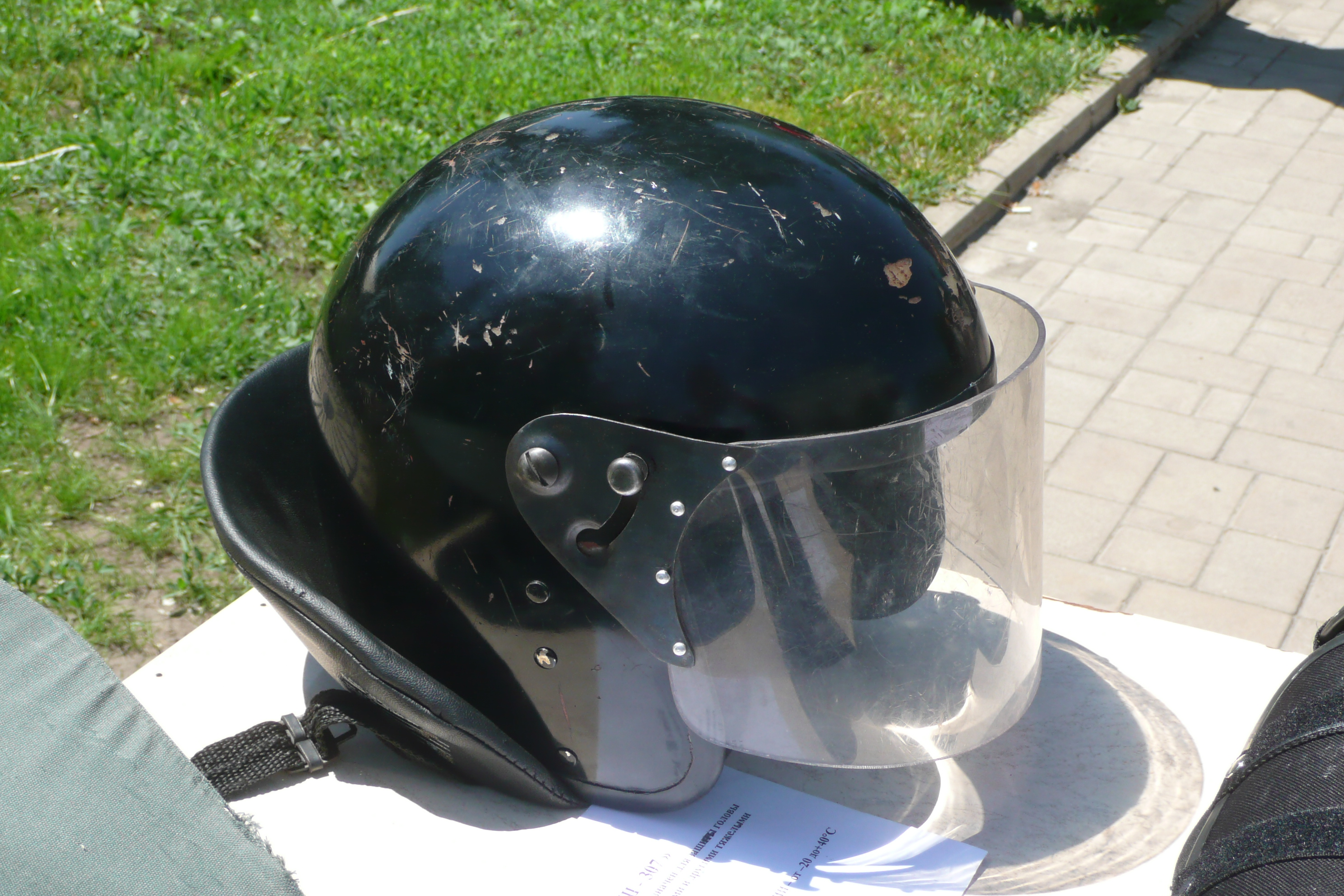 День защиты детей в Донецке